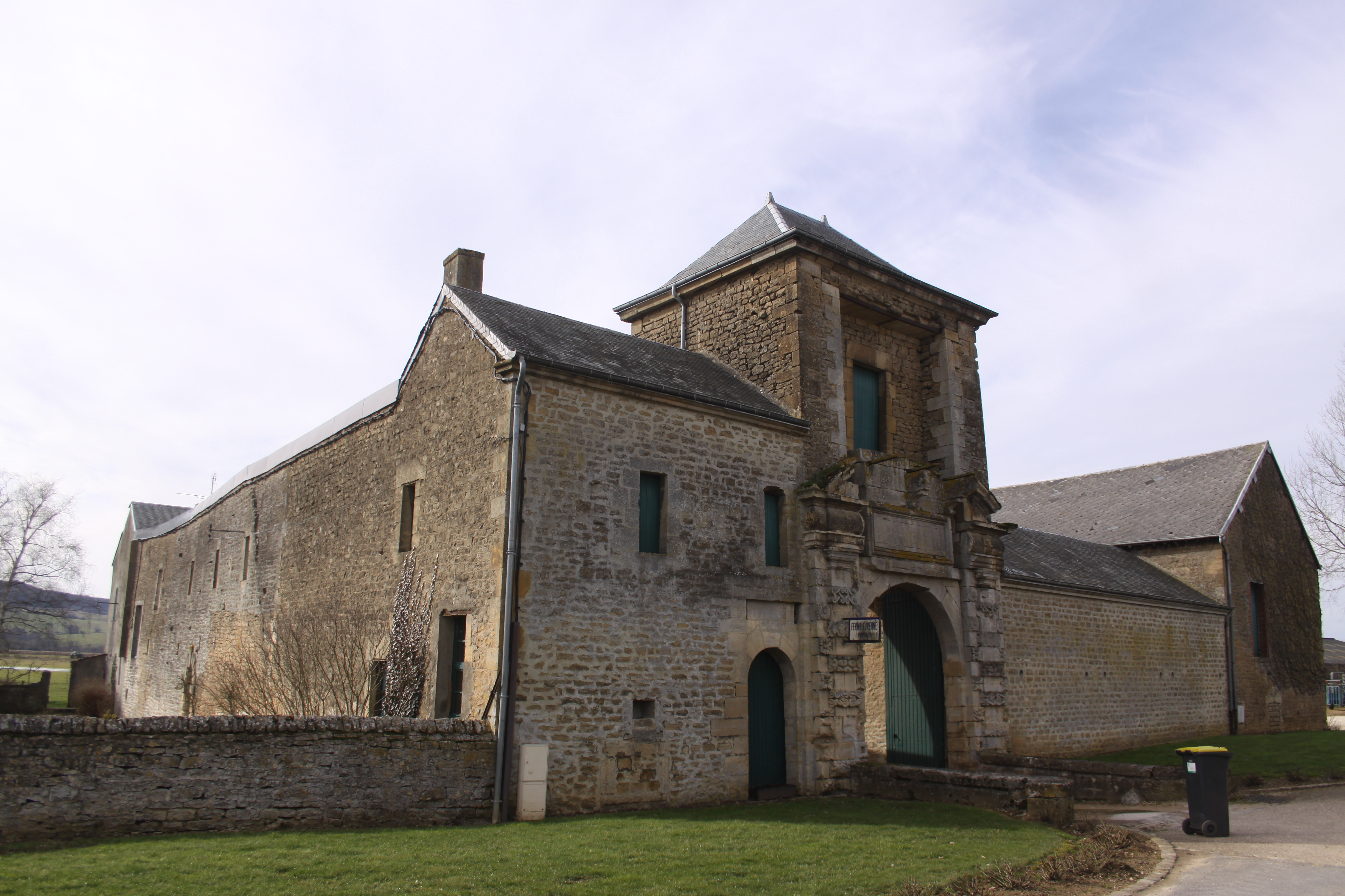 Château de Turenne, à Bazeilles (Ardennes, France) .